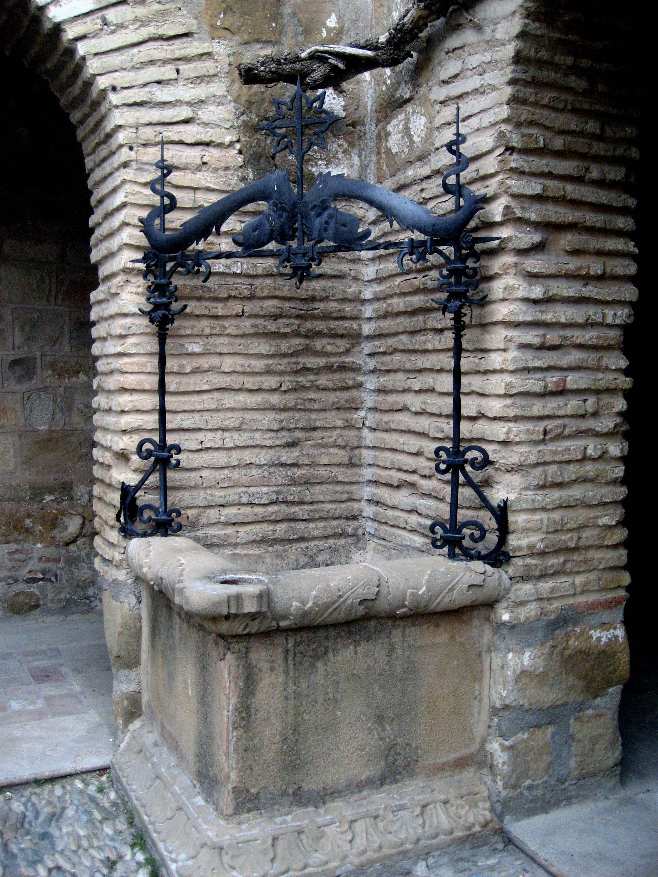 Brocal de pozo en el Palacio de Mengíbar (Jaén). Anadalucía (España)